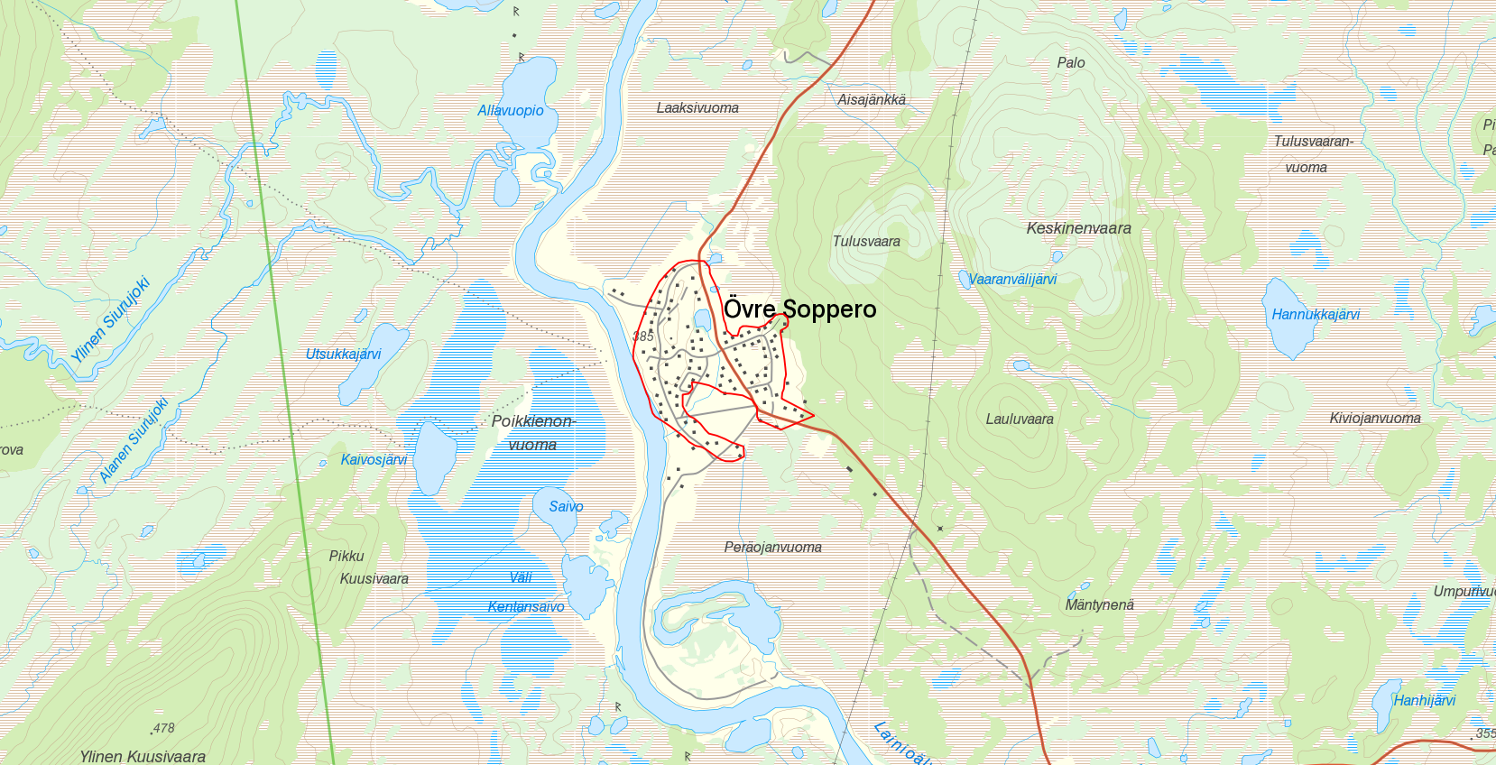 Tätorten Övre Soppero med gränserna från Statistiska centralbyråns tätortsavgränsning 2010. Bakgrundskarta från Lantmäteriet, skala 1:30 236.